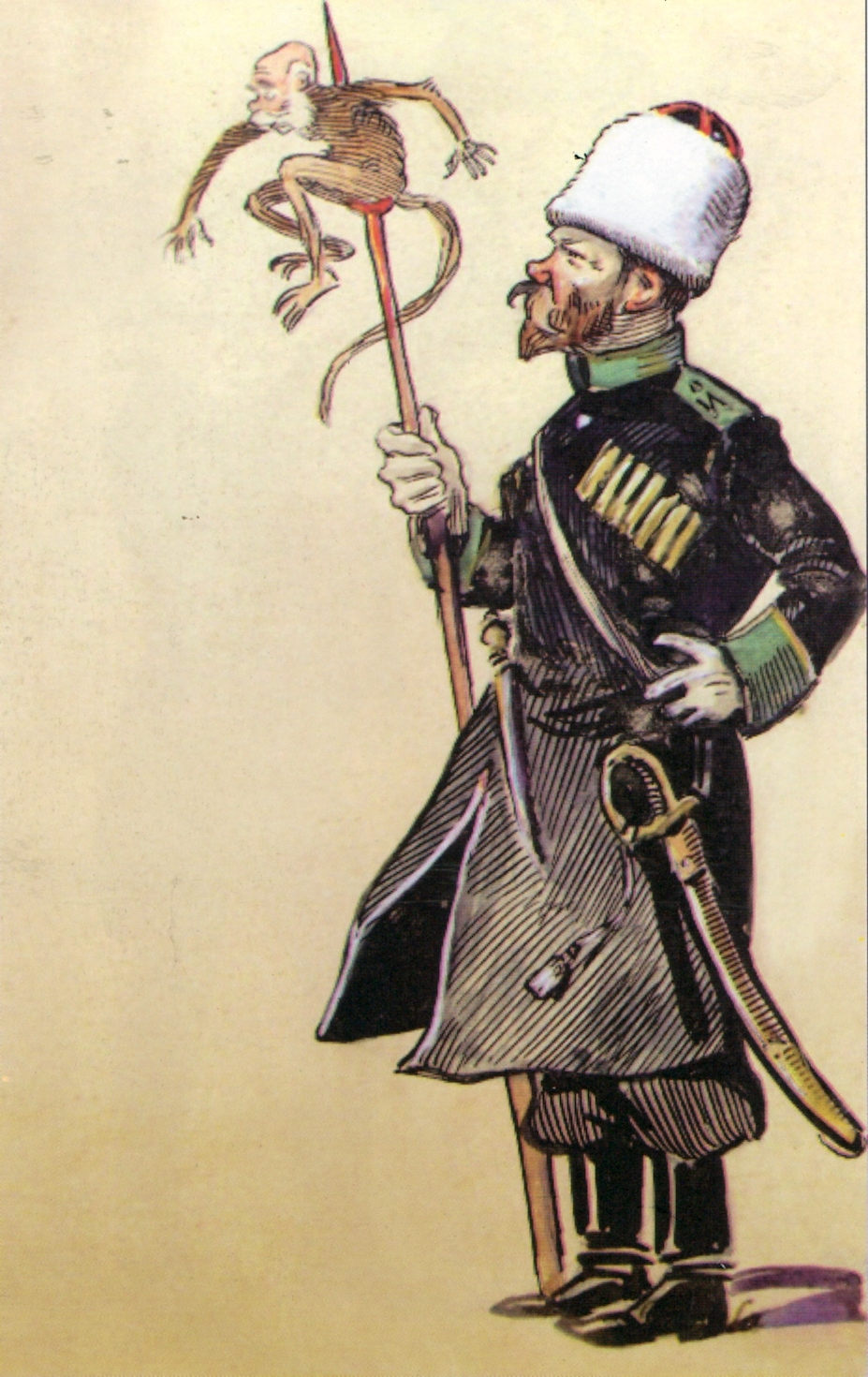 Țarul Nicolae al II-lea al Rusiei